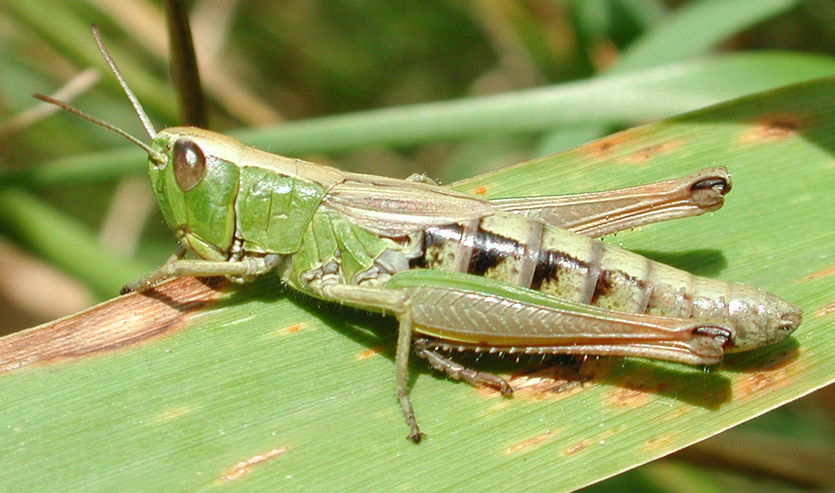 Chorthippus parallelus, f., Gemeiner Grashüpfer, Weibchen, NSG Kirchwerder Wiesen, Elbmarsch bei Hamburg, Deutschland